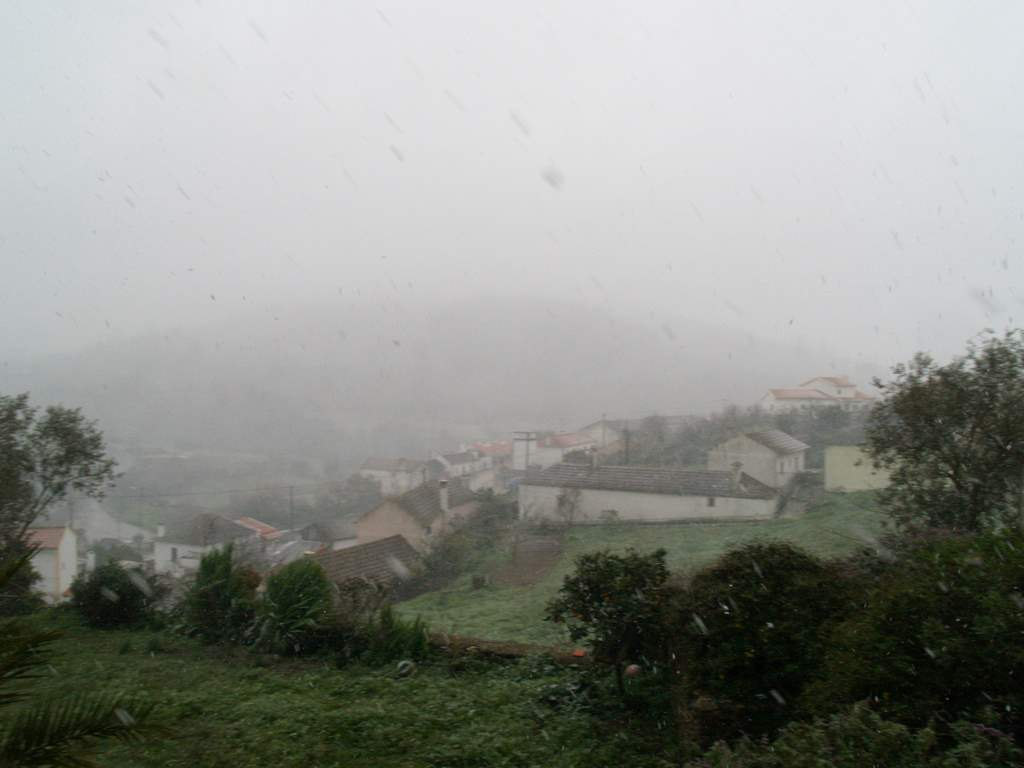 Tal como em boa parte do país, também nevou no Rogel em Janeiro de 2004.